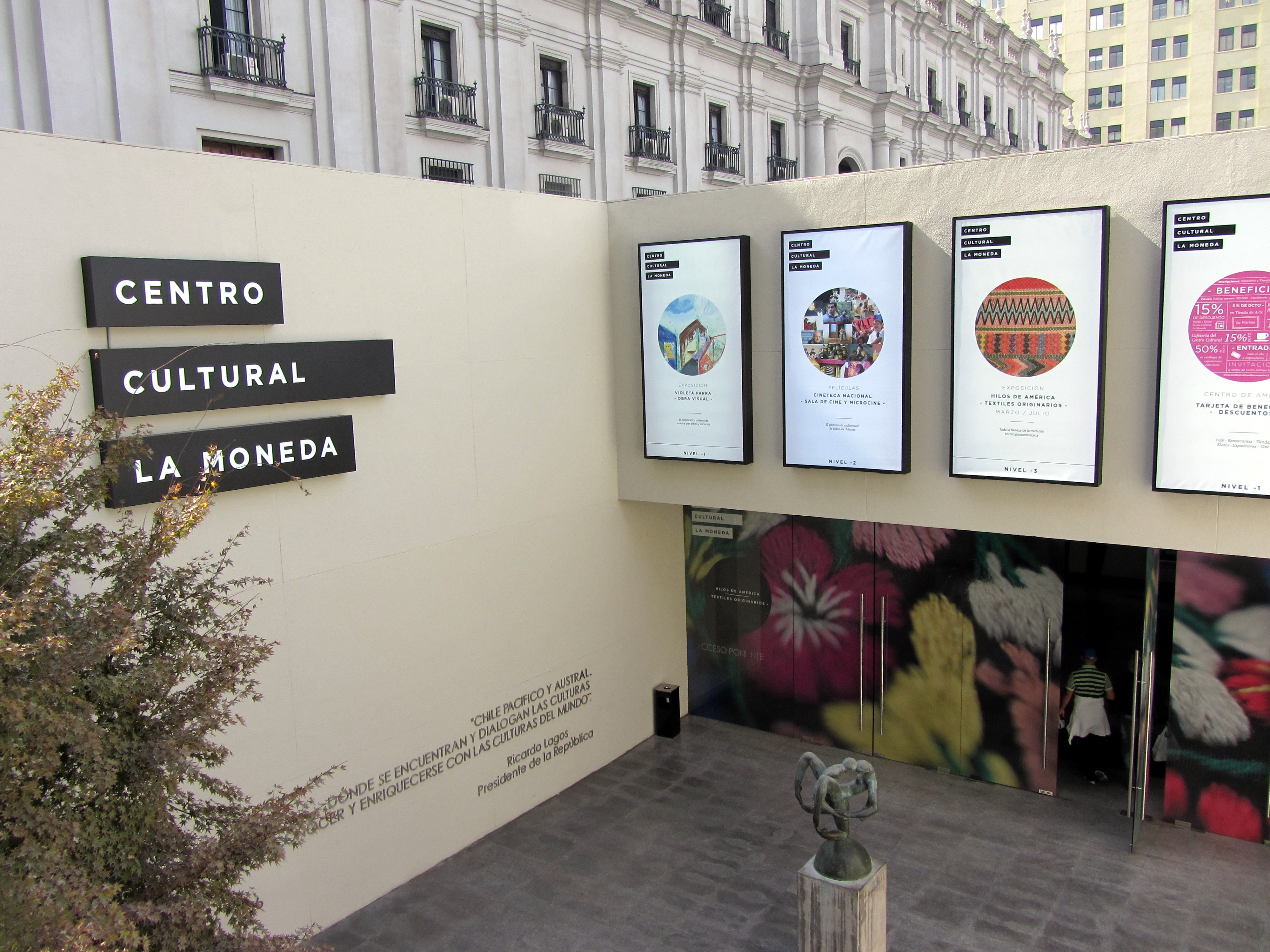 Entrada al Centro Cultural Palacio de La Moneda, plaza de la Ciudadanía, Santiago de Chile. Abajo se ve la escultura Tierra, de Tótila Albert.